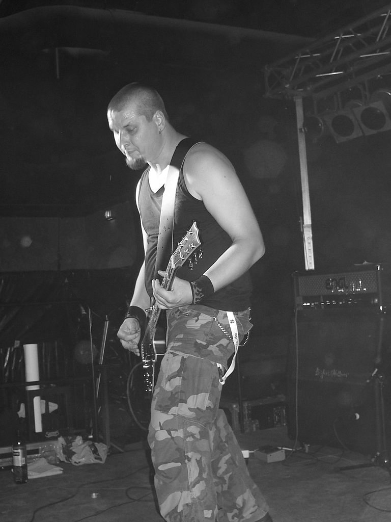 Pete Loisa ex-guitarrista de Immortal Souls